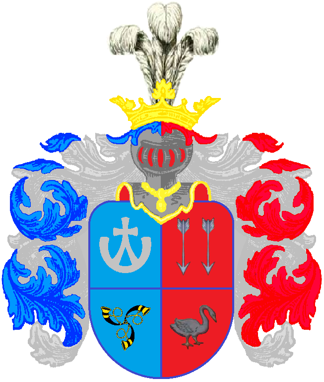 Герб "Лозки I"